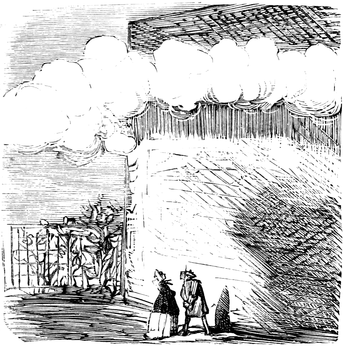 Art. 658. — Tout copropriétaire peut faire exhausser le mur mitoyen, mais il doit seul payer la dépense de l’exhaussement. Comme c’est agréable pour vous si votre propriétaire ne regarde pas la dépense !